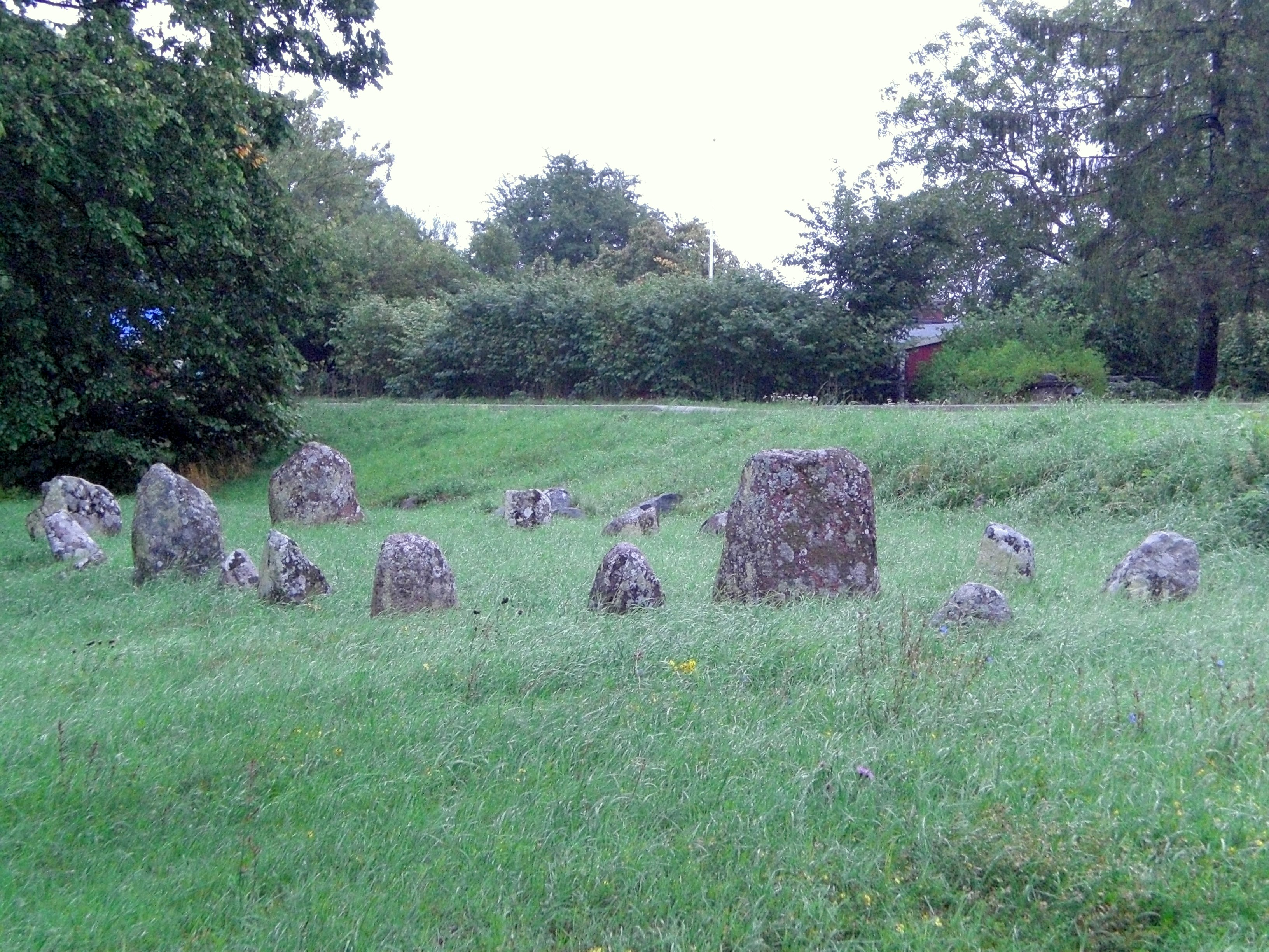 Schiffssetzung an der Landstraße 136 in Borgholm auf Öland, Schweden